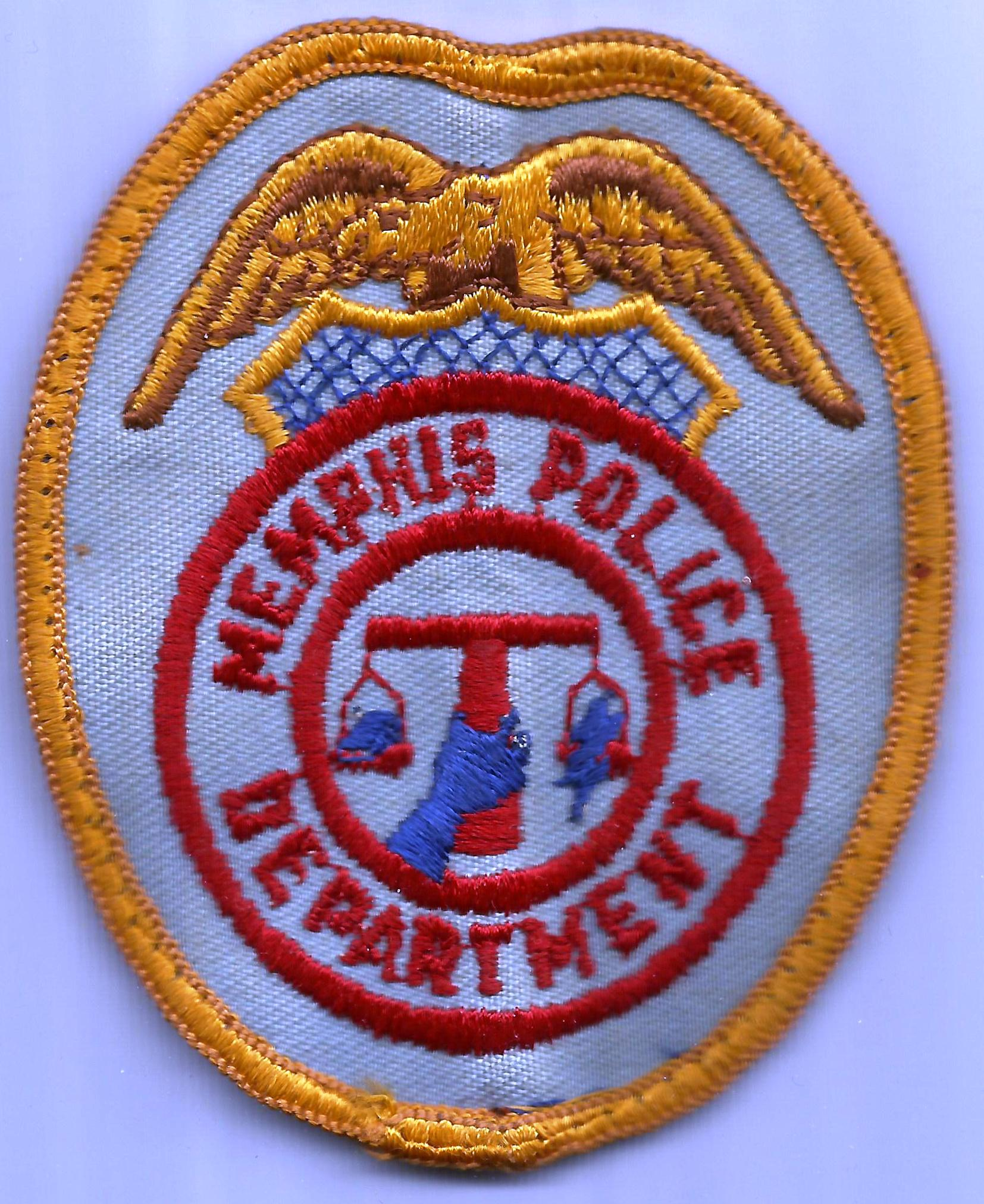 USA - TENNESSEE - Memphis police department